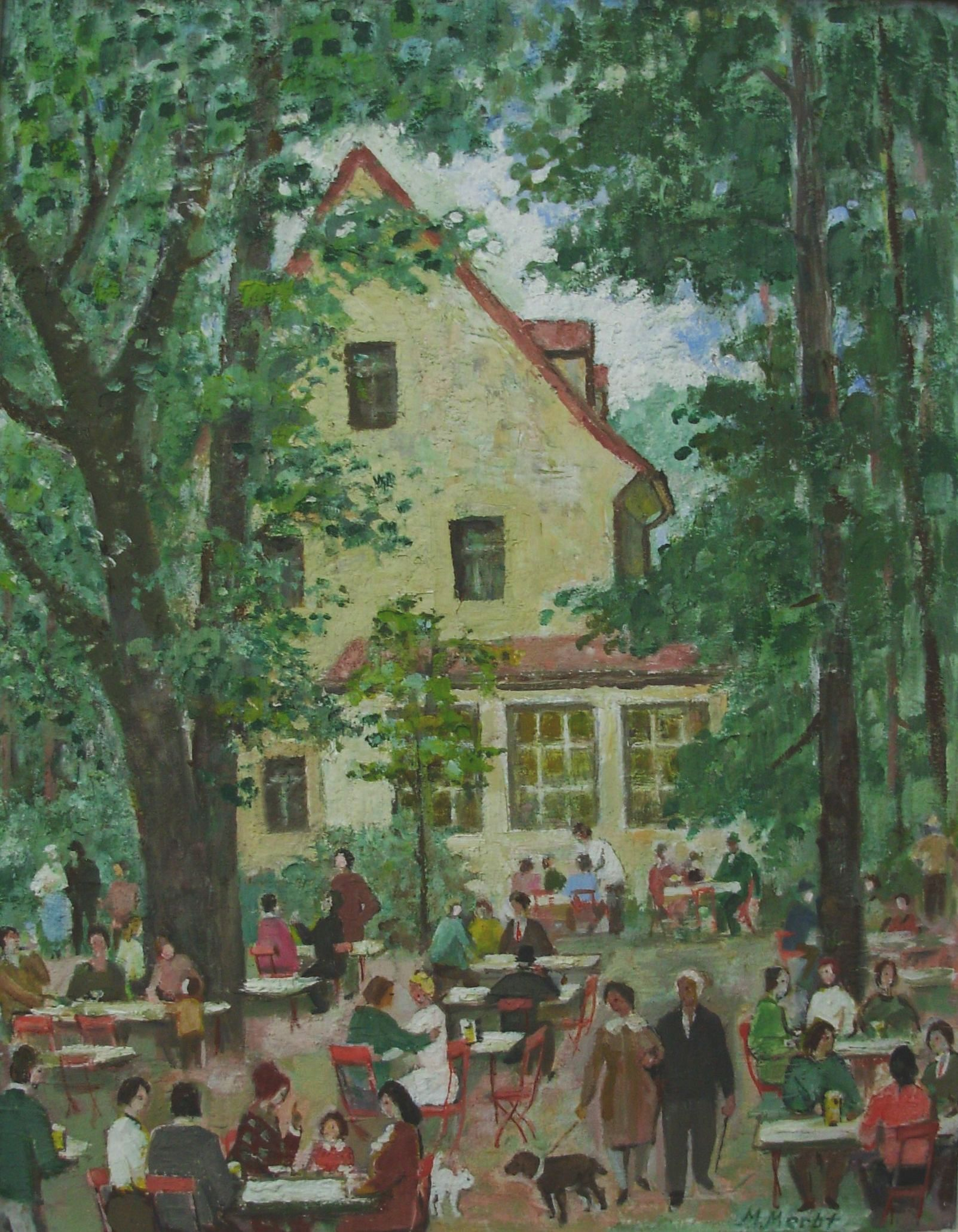 Ölbild "Waldmax" des Malers Max Merbt